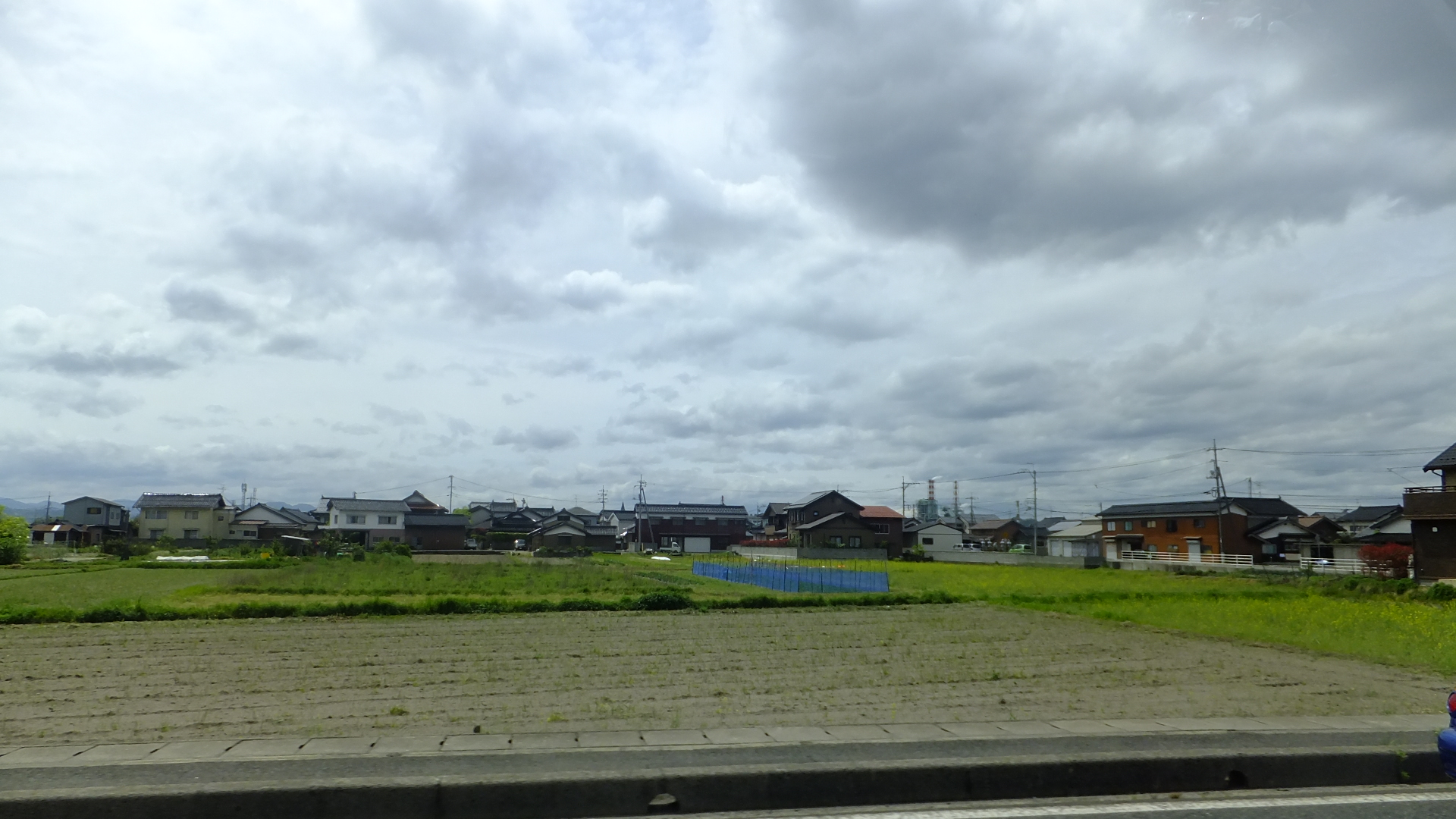 鳥取県西伯郡日吉津村日吉津